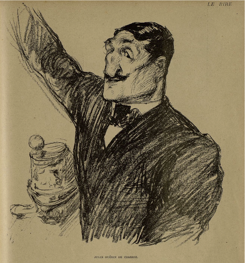 Jules Guérin caricaturé par Charles Léandre en 1899 dans le journal Le Rire pendant son procès en Haute Cour de justice.